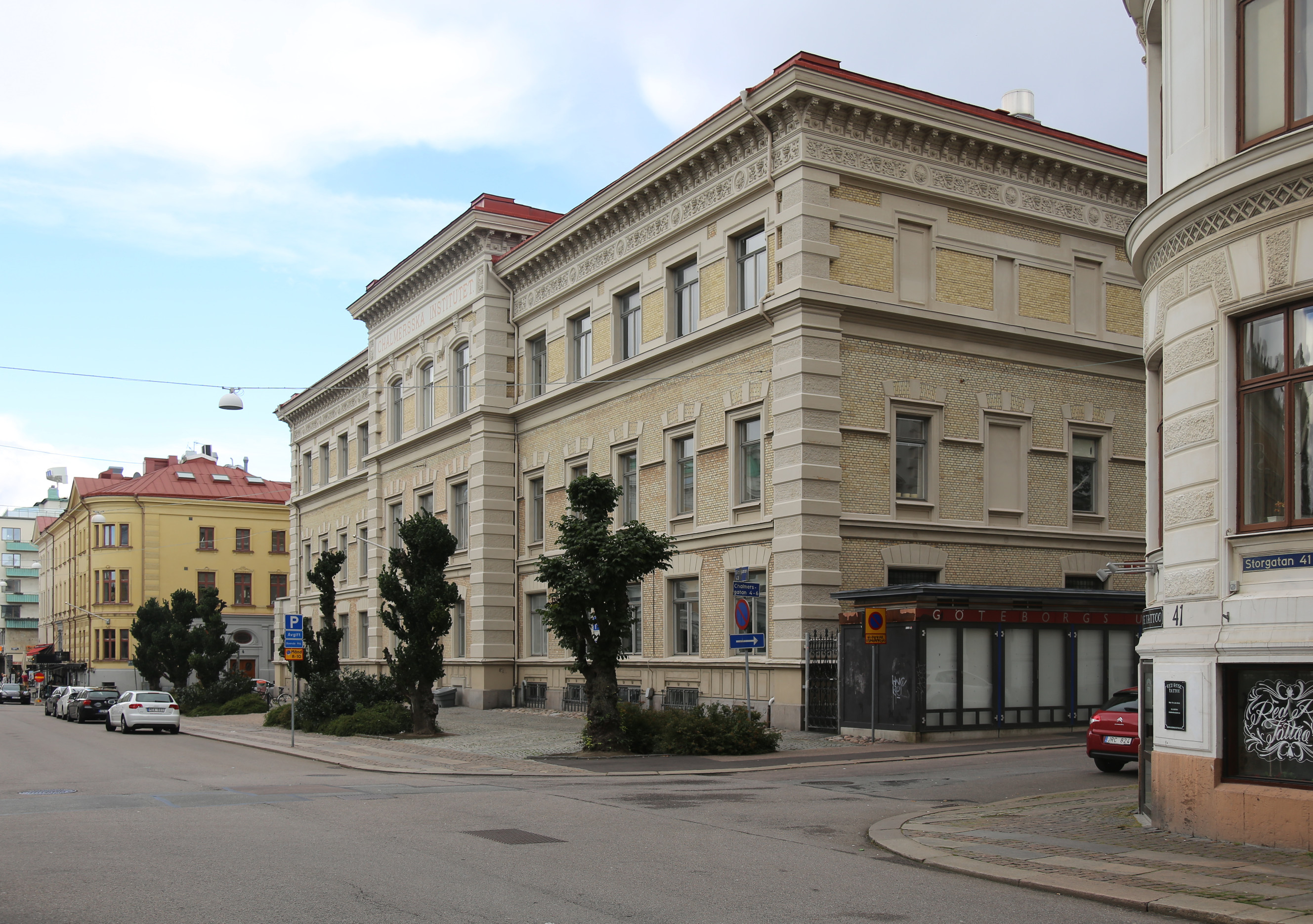 Före detta chalmers. Storgatan 43 i Göteborg. This is a contemporary depiction of the image at This image was uploaded as part of the competition (Then and Now). English | Svenska | +/−